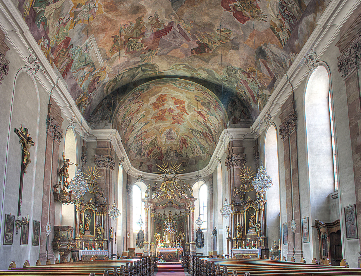 Muttergottespfarrkirche in Aschaffenburg, Bayern (Deutschland)